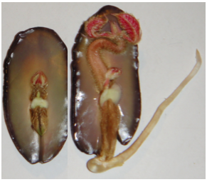 desarrollo